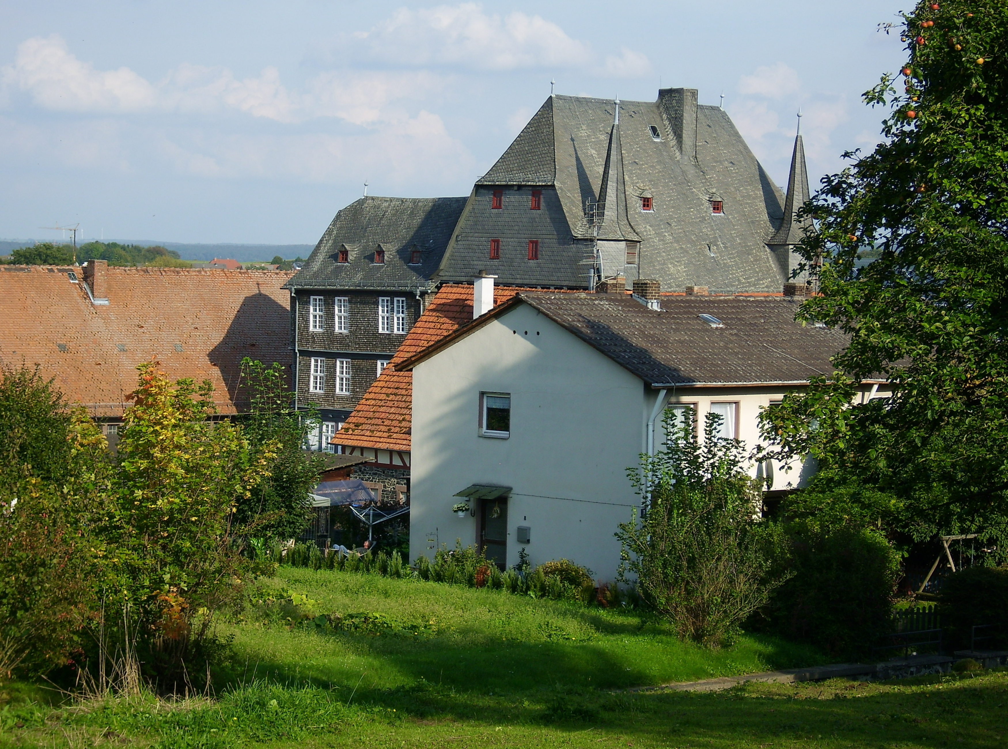 Rauischer Gutshof in Rauischholzhausen, frühgotisches Herrenhaus aus der 1. Hälfte des 16. Jahrhunderts. Westansicht vom Kirchberg aus.